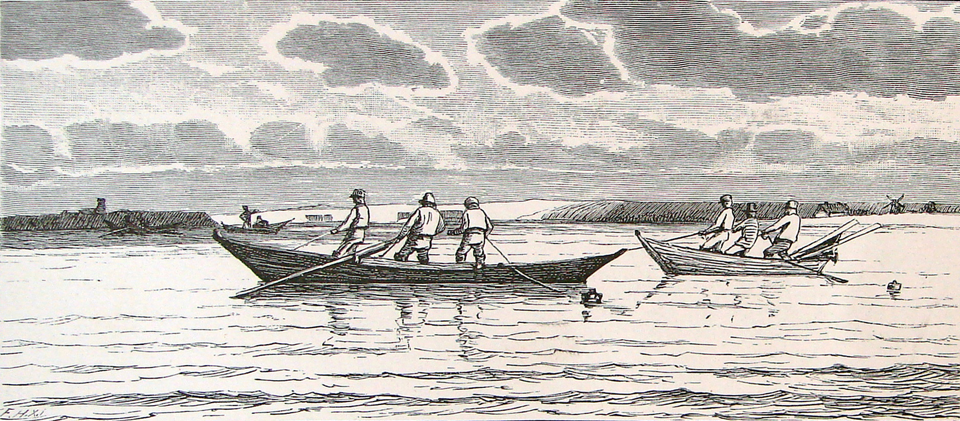 Snurrevodsfiskere i Limfjorden